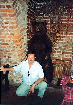 Profesor Marek Ordyłowski w Wilnie, w swojej ulubionej restauracji "Lokis"